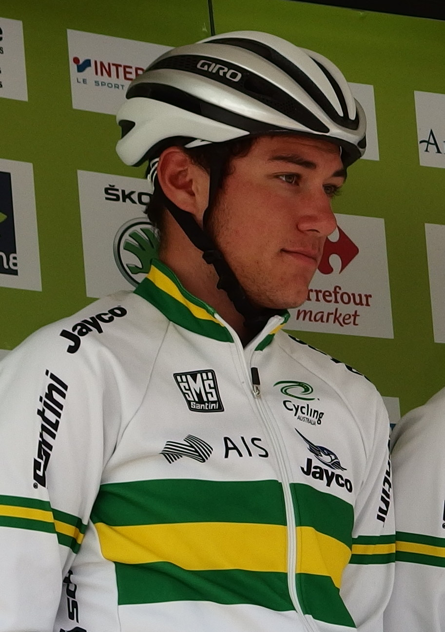 Tour de Bretagne 2015 - Présentation des équipes au départ de la troisième étape à Baud - Équipe nationale d'Australie Depicted person: Robert Power